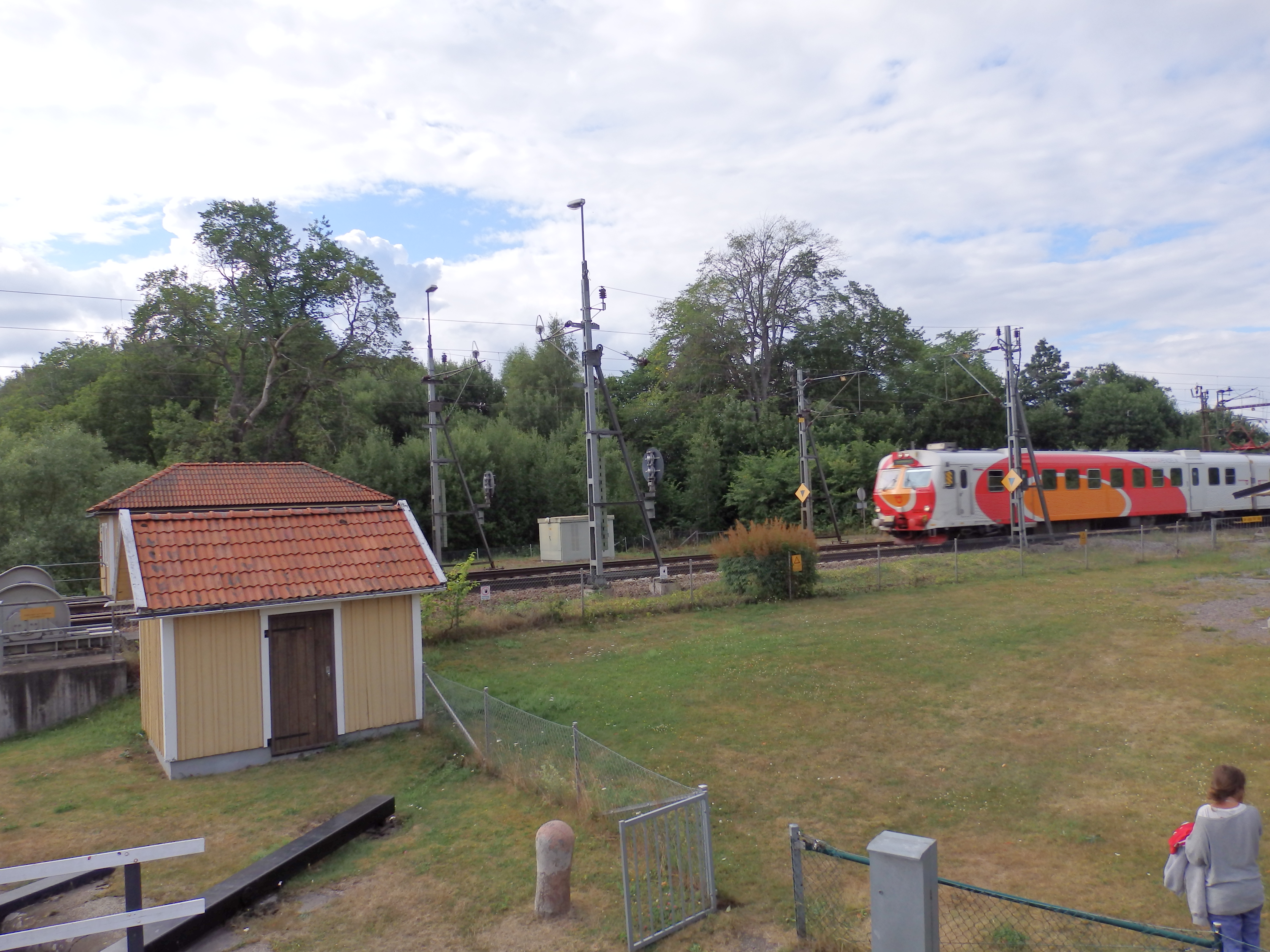 Tog passerer Norsholm